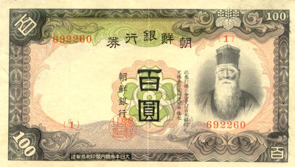 100 yen coreanos